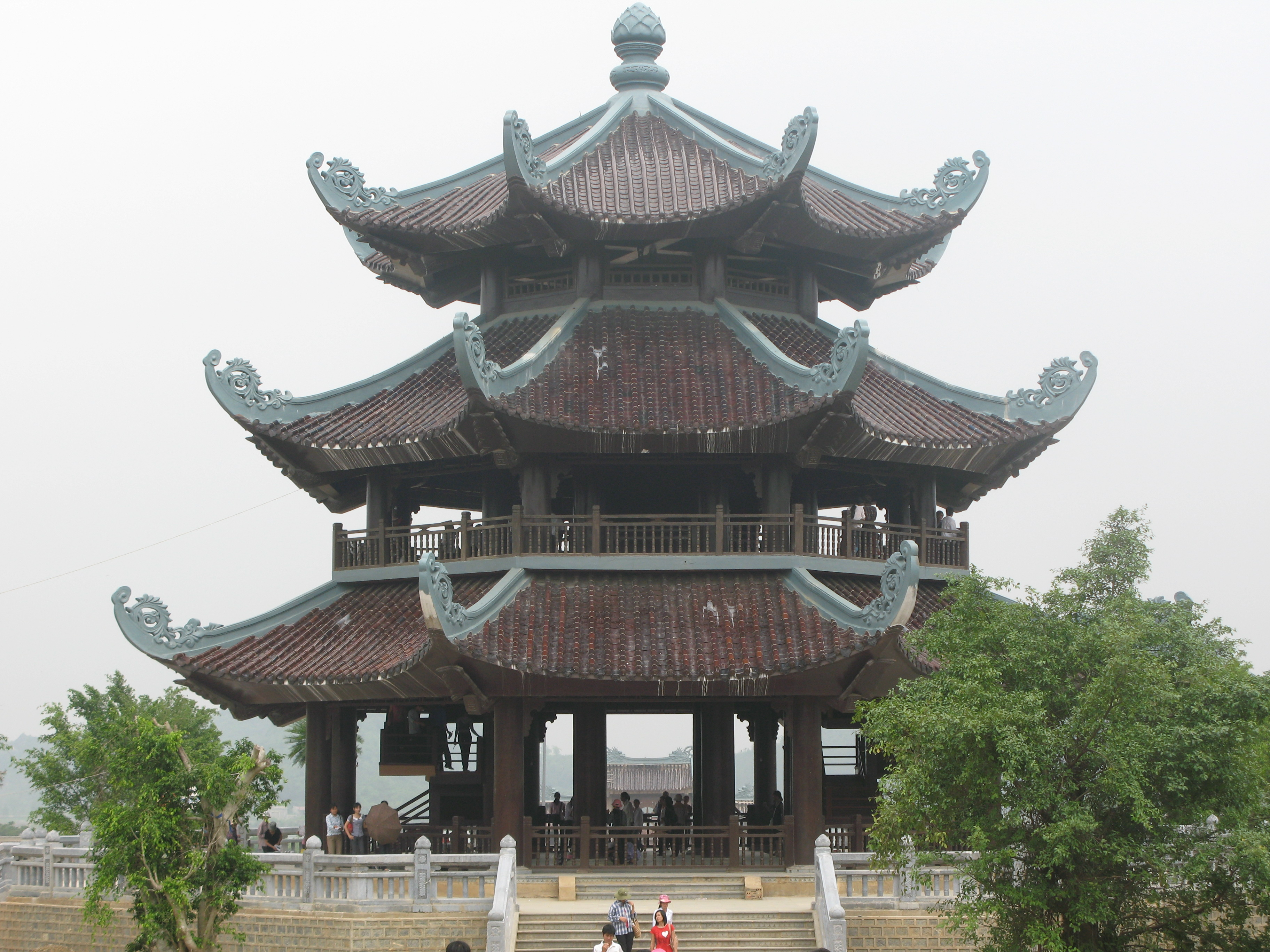 Gác chuông chùa Bái Đính, Ninh Bình